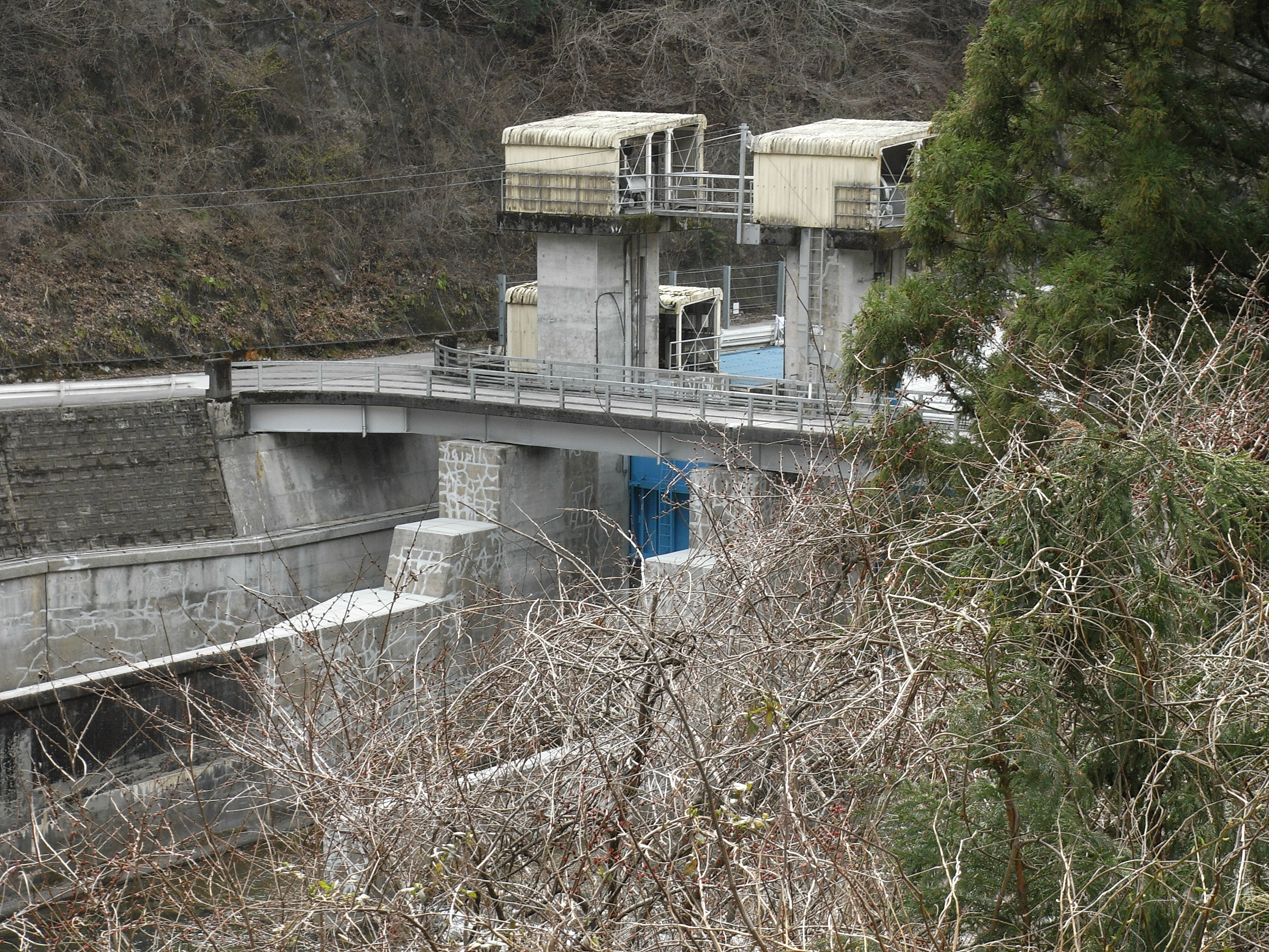 Dam